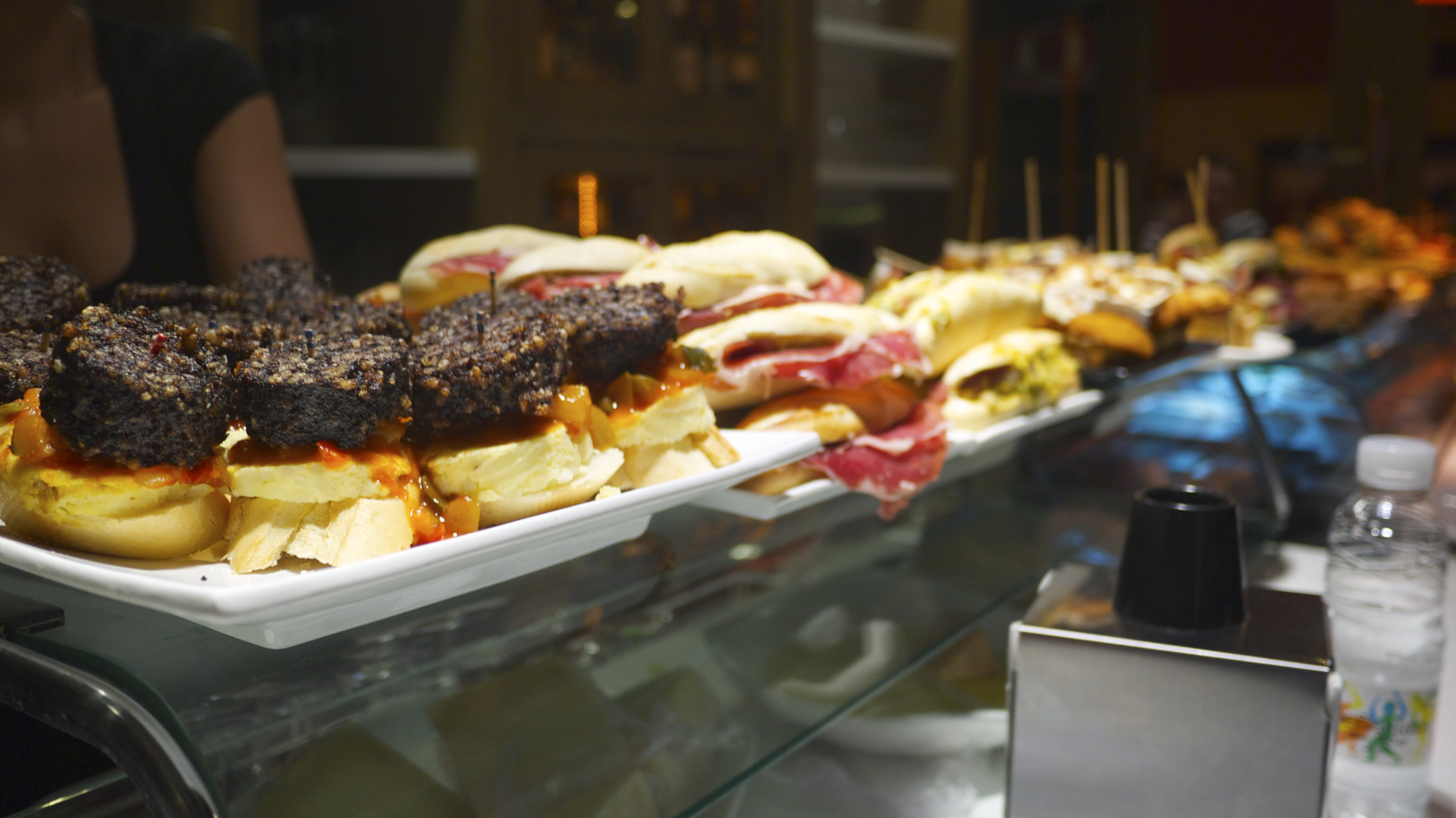 應該是Logrona的La Fontana，我們點了燉飯馬鈴薯與炸花枝